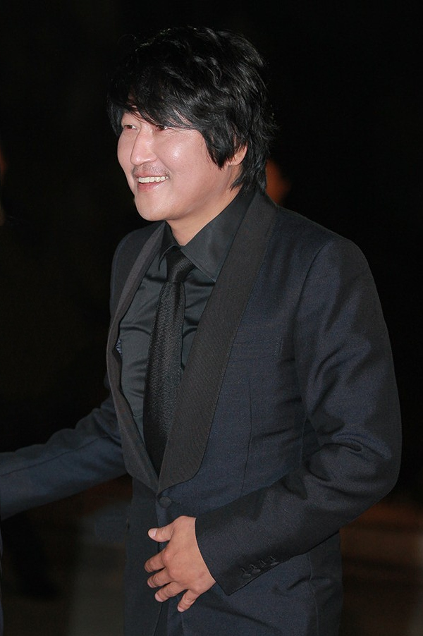 2013 청룡영화제